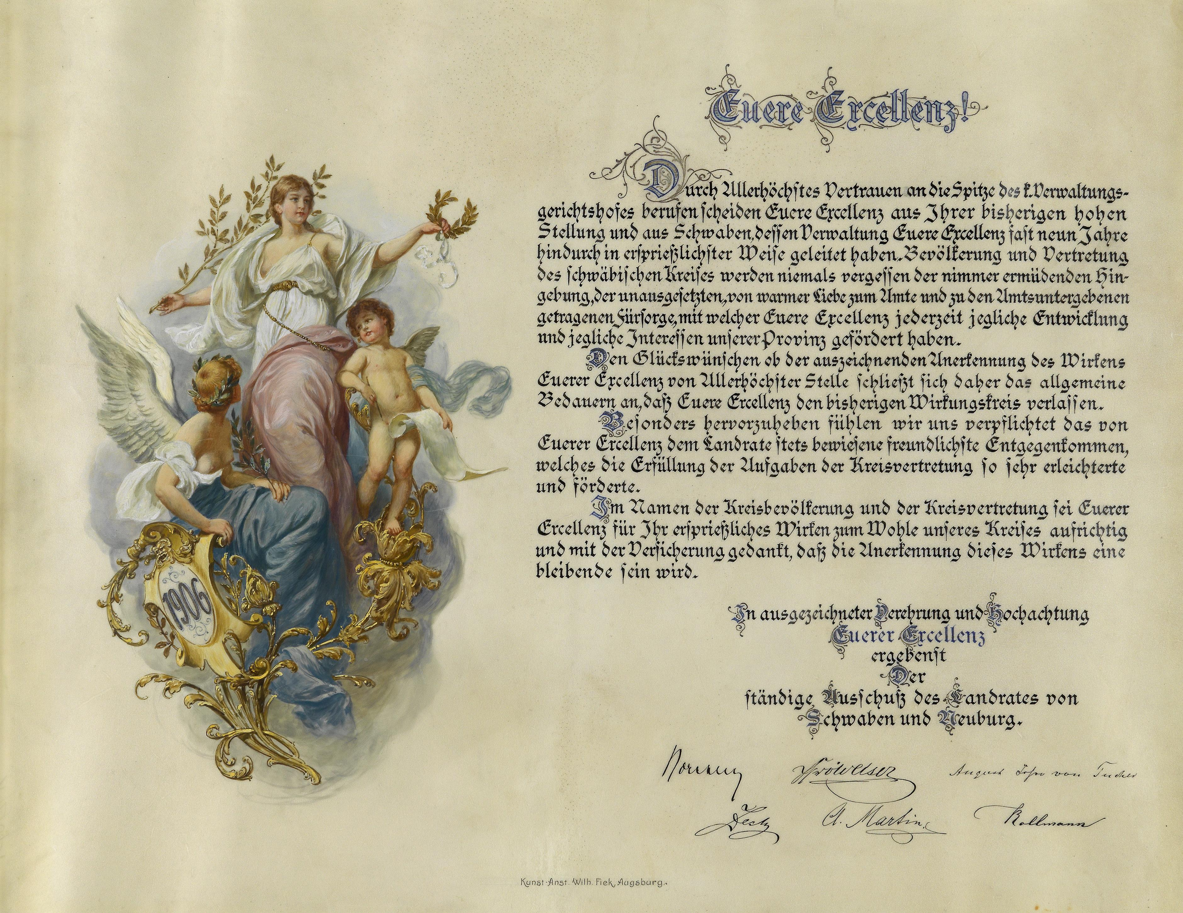 Glückwunschadresse des Ausschusses des Landrats von Schwaben und Neuburg für den scheidenden Regierungspräsidenten Wilhelm Ritter von Lermann (1846-1917), 1906, 42,5 x 57 cm, Unterschriften u. a. von Fr. v. Wieser und August Freiherr v. Tucher, Darstellung unten signiert "Kunst. Anst. Wilh. Fink. Augsburg".